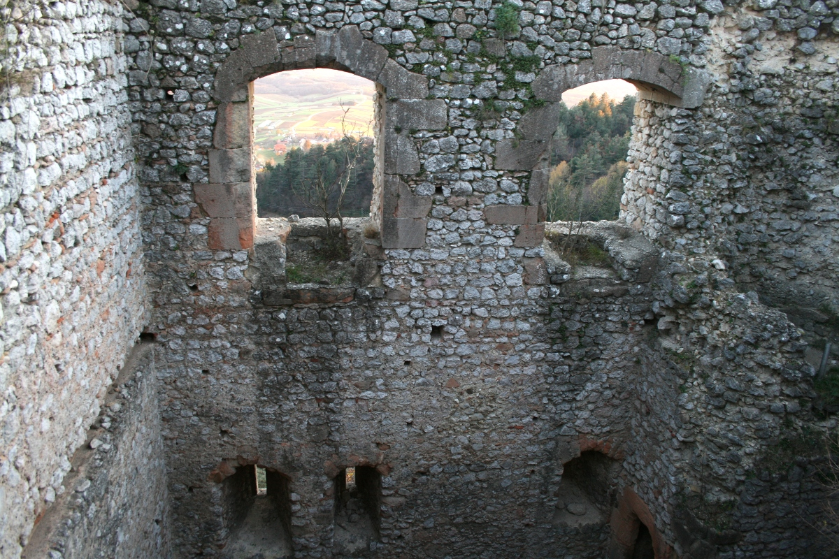 stari grad Kalnik, pogled iznutra na zidine